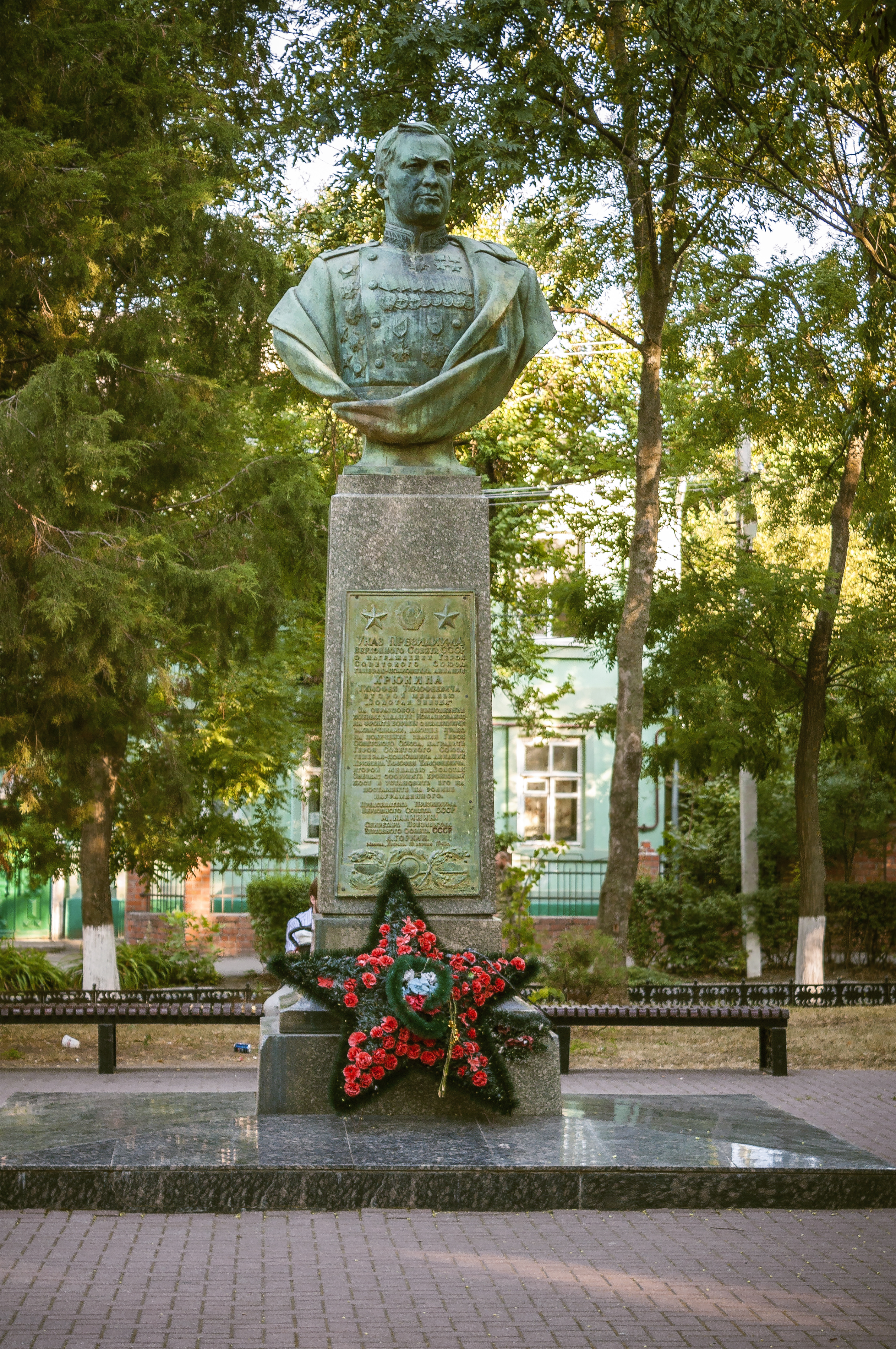 Бюст дважды Героя Советского Союза Хрюкина Т.Т.: парк им.Горького, Ейск, Ейский район, Краснодарский край